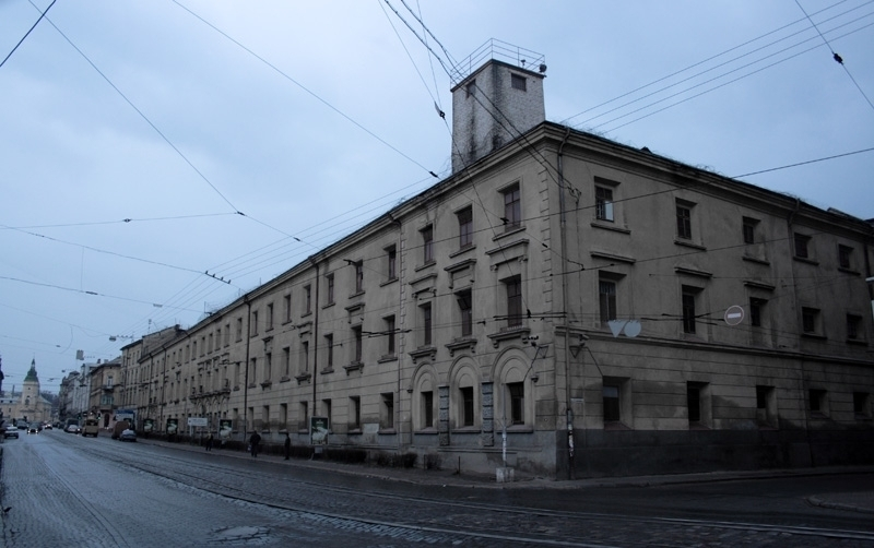 Brygidki prison, Lviv